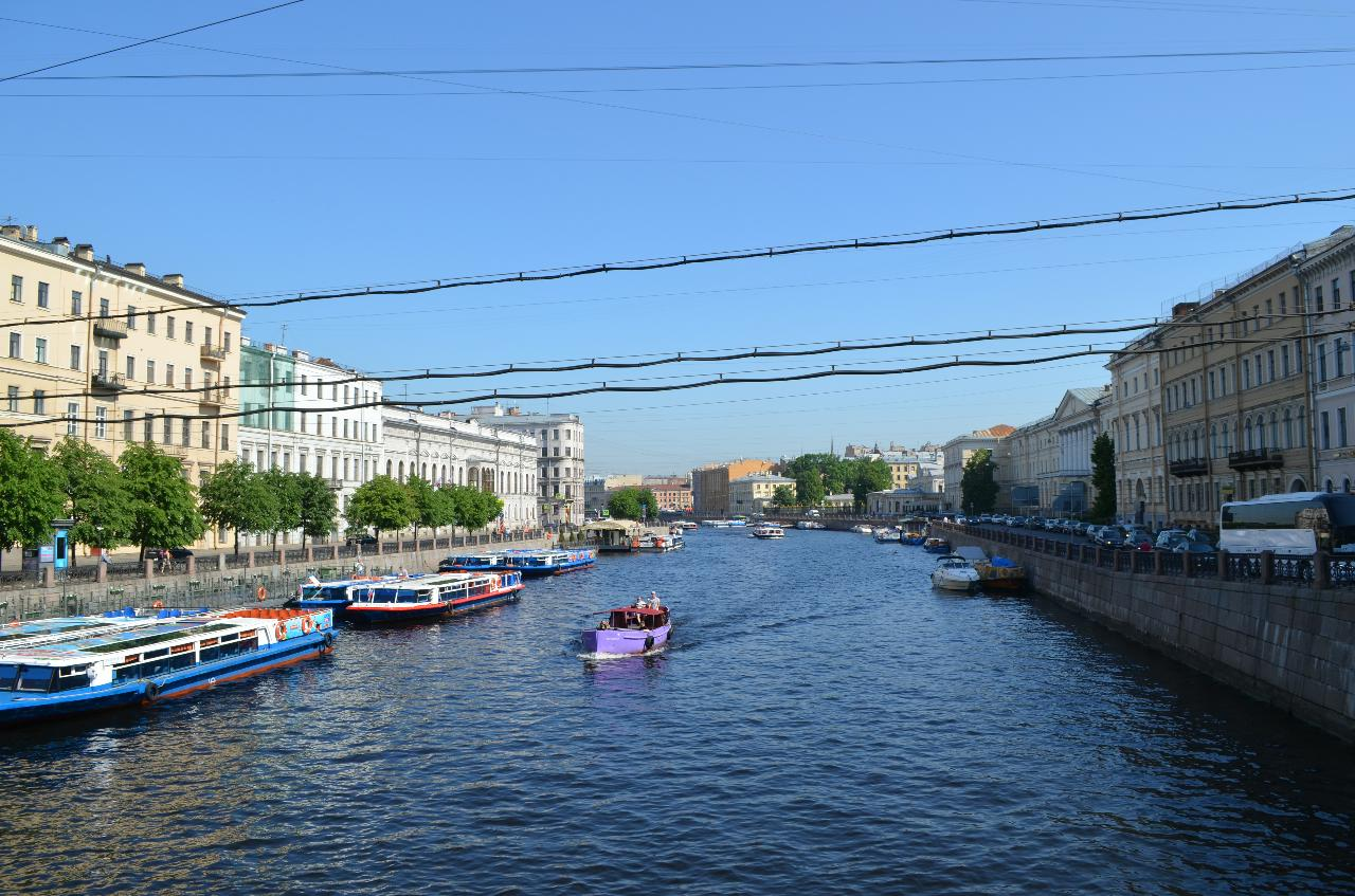 Санкт-Петербург. Фонтанка с Аничкова моста, вид на север